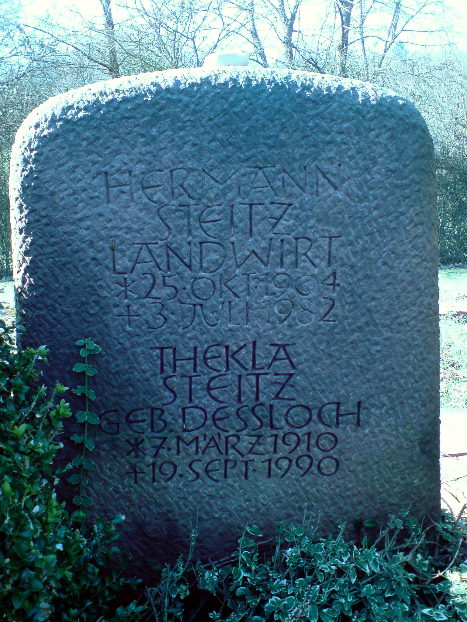 Das Grabmal des Landtagsabgeordneten Hermann Steitz in Websweiler